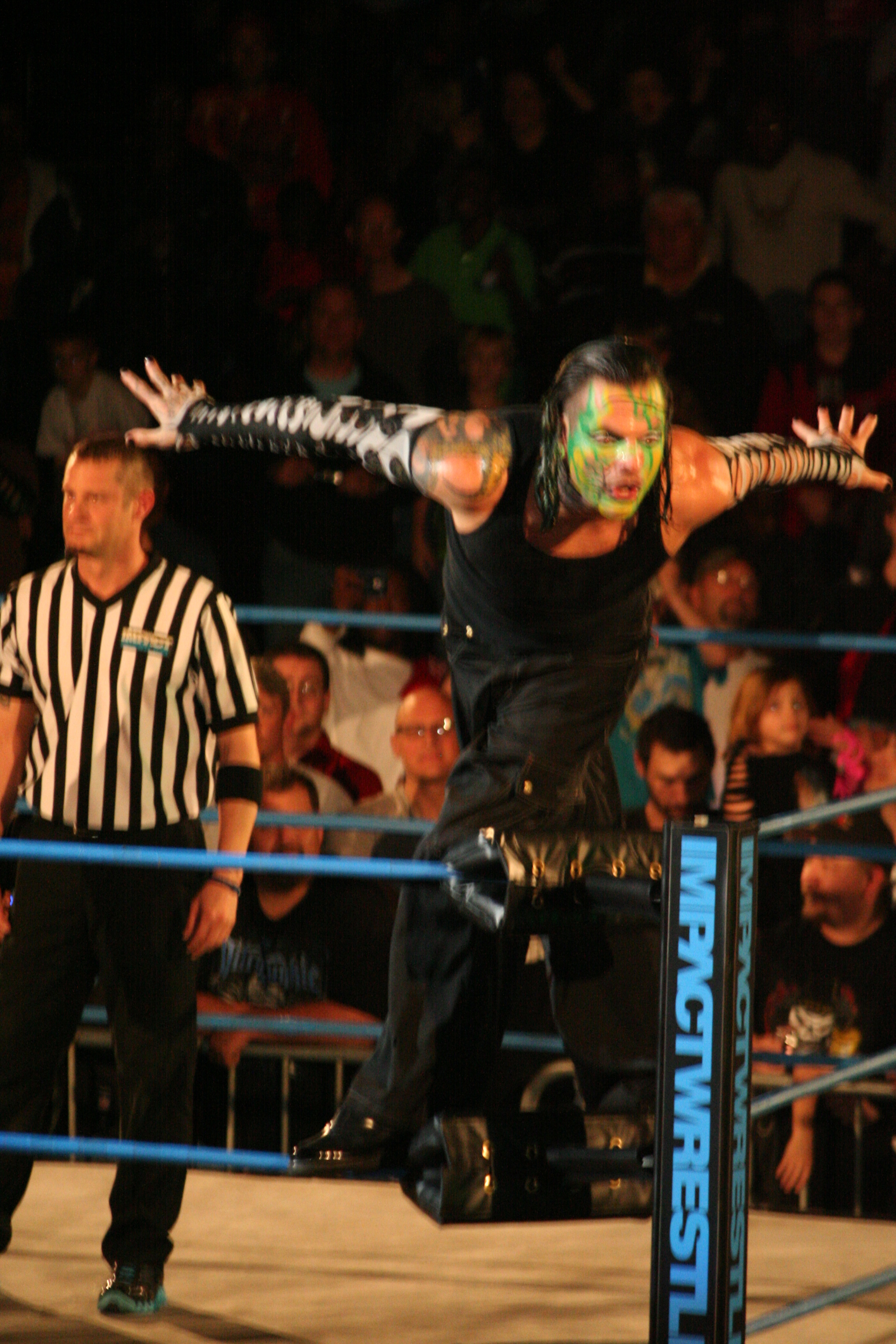 Jeff Hardy durant son entrée